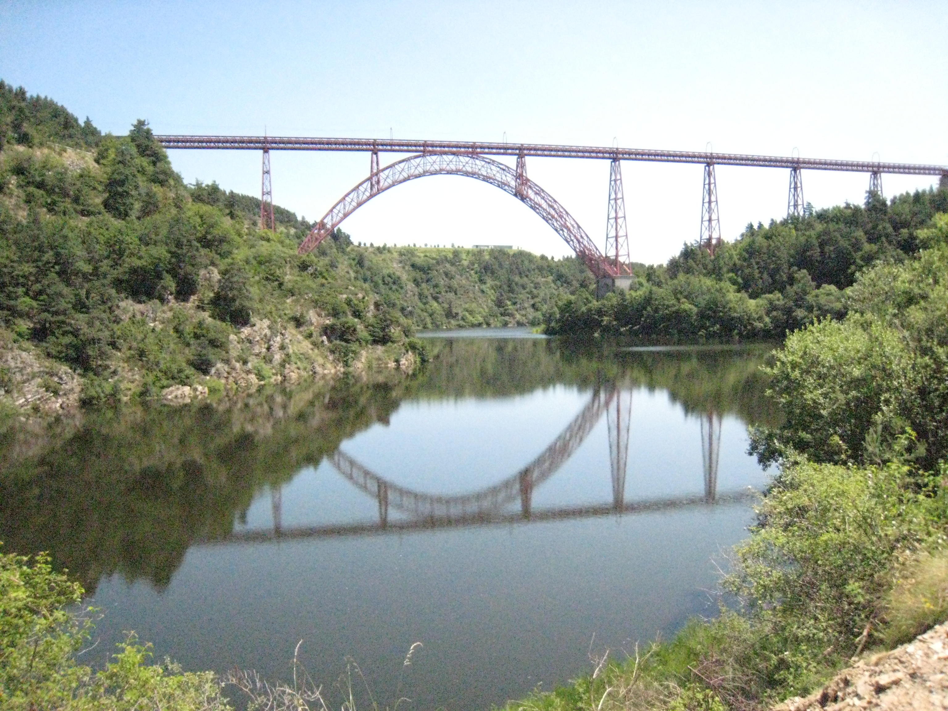 Viaducto de Garabit, desde el SW, reflejado en el embalse de Grandval